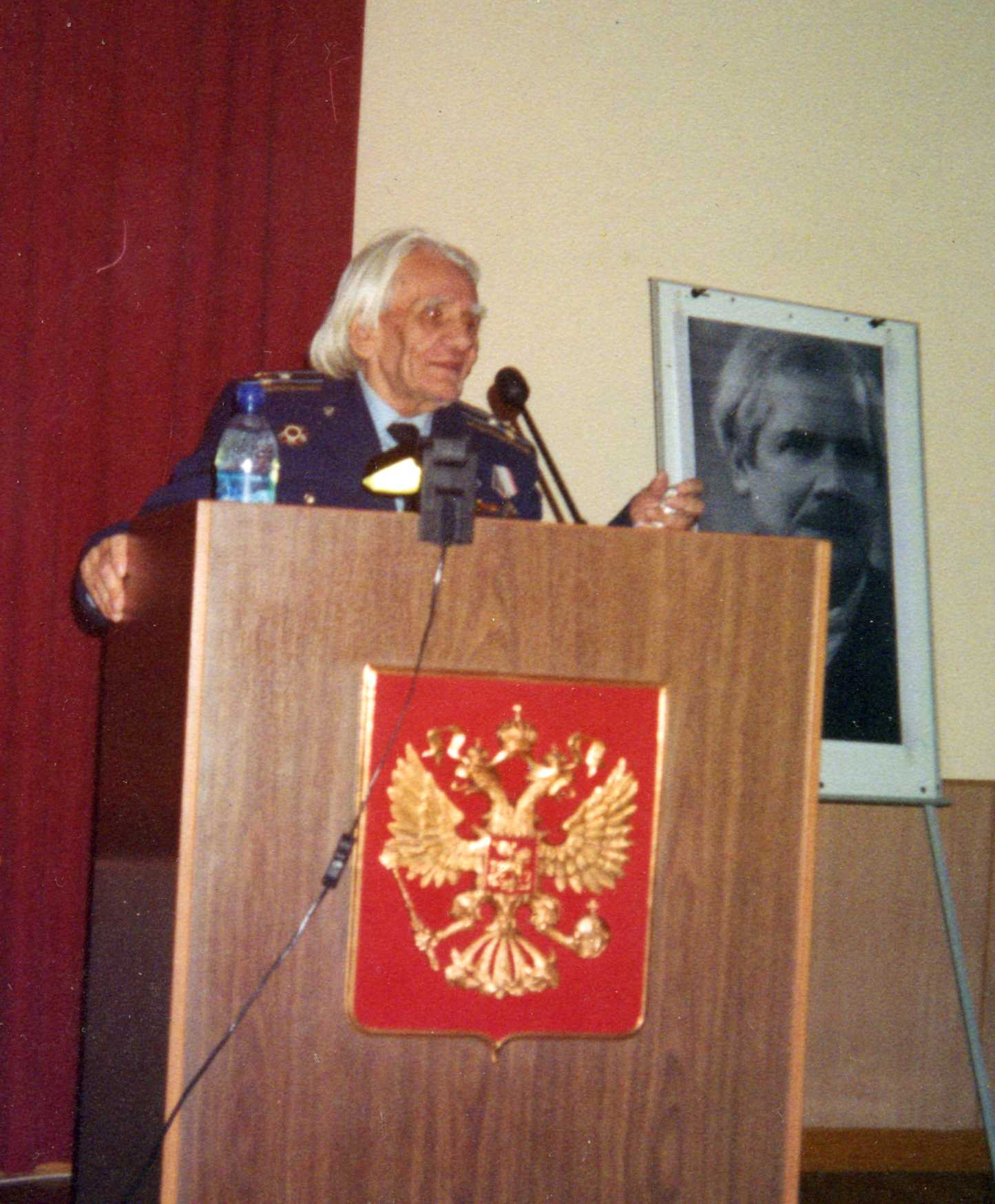 Выступление на научной конференции посвященной 100-летию со дня рождения И.Ф. Случевского